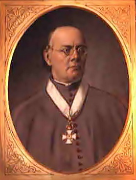 Johann Michael Raich (1832-1907), Mainzer Domdekan